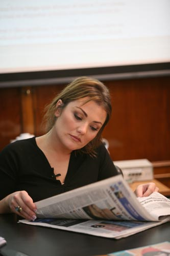 Amaia Montero, componentes de "La Oreja de Van Gogh" en un encuentro digital de 20 Minutos.